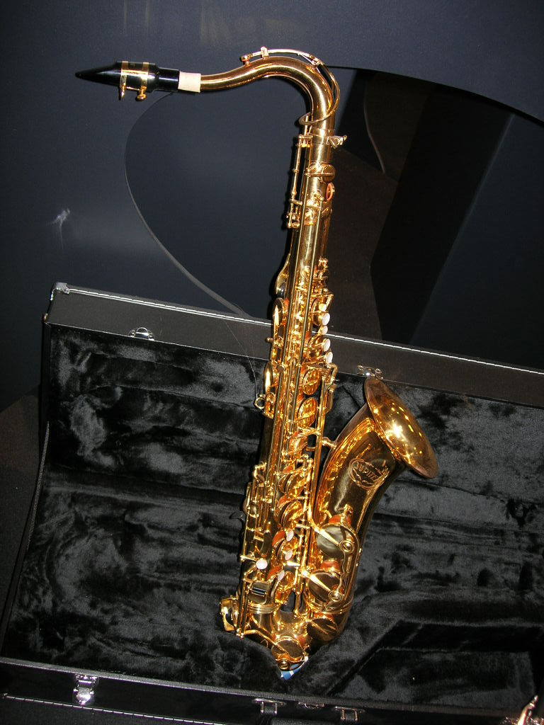 Sax Tenor, foto tirada por mim em exposição de instrumentos.